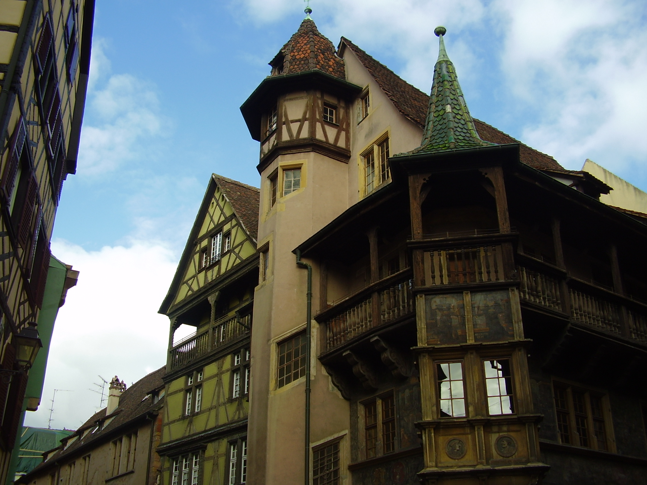 Οικία Πφίστερ, Κολμάρ